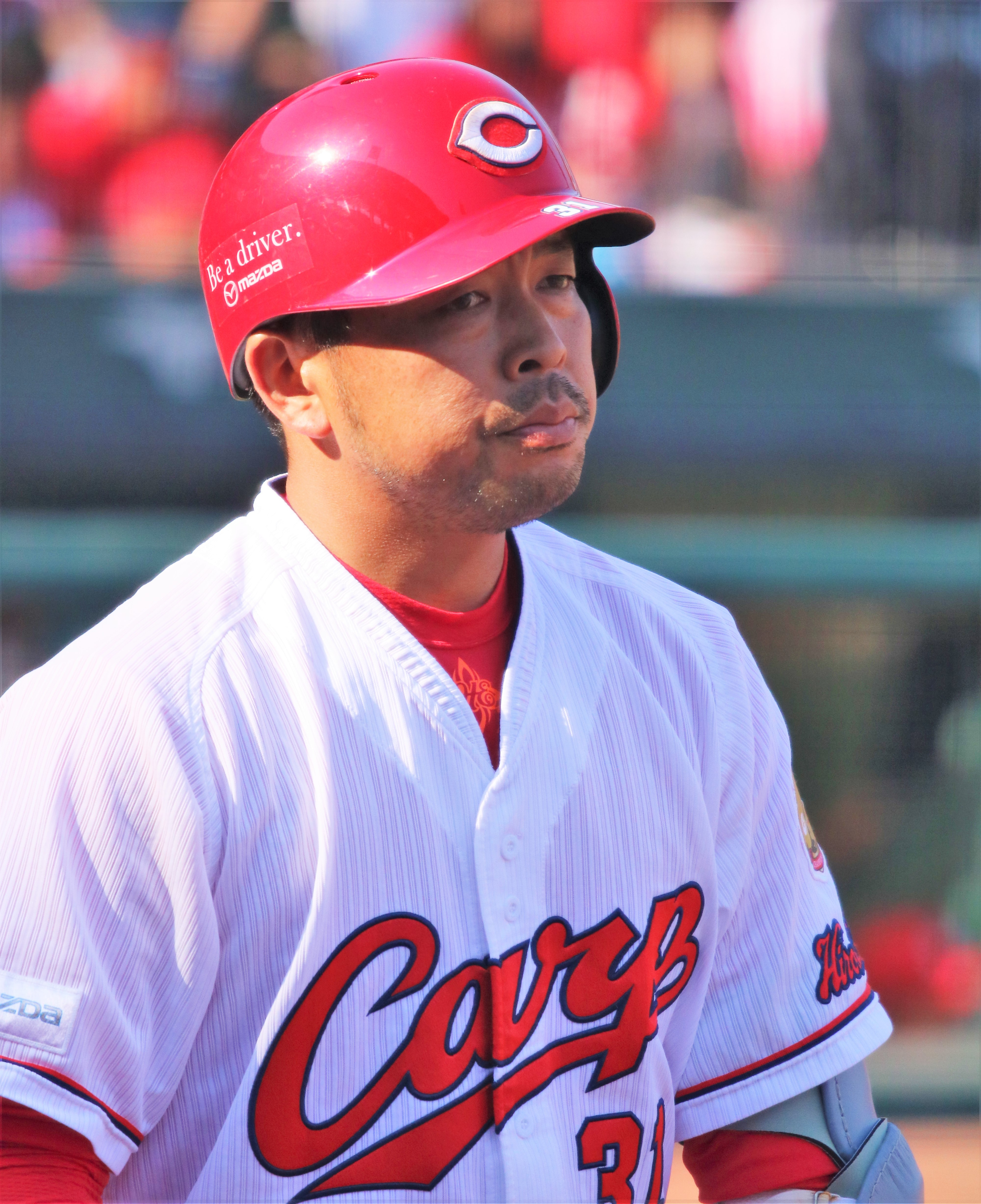 2018/3/13 マツダスタジアム